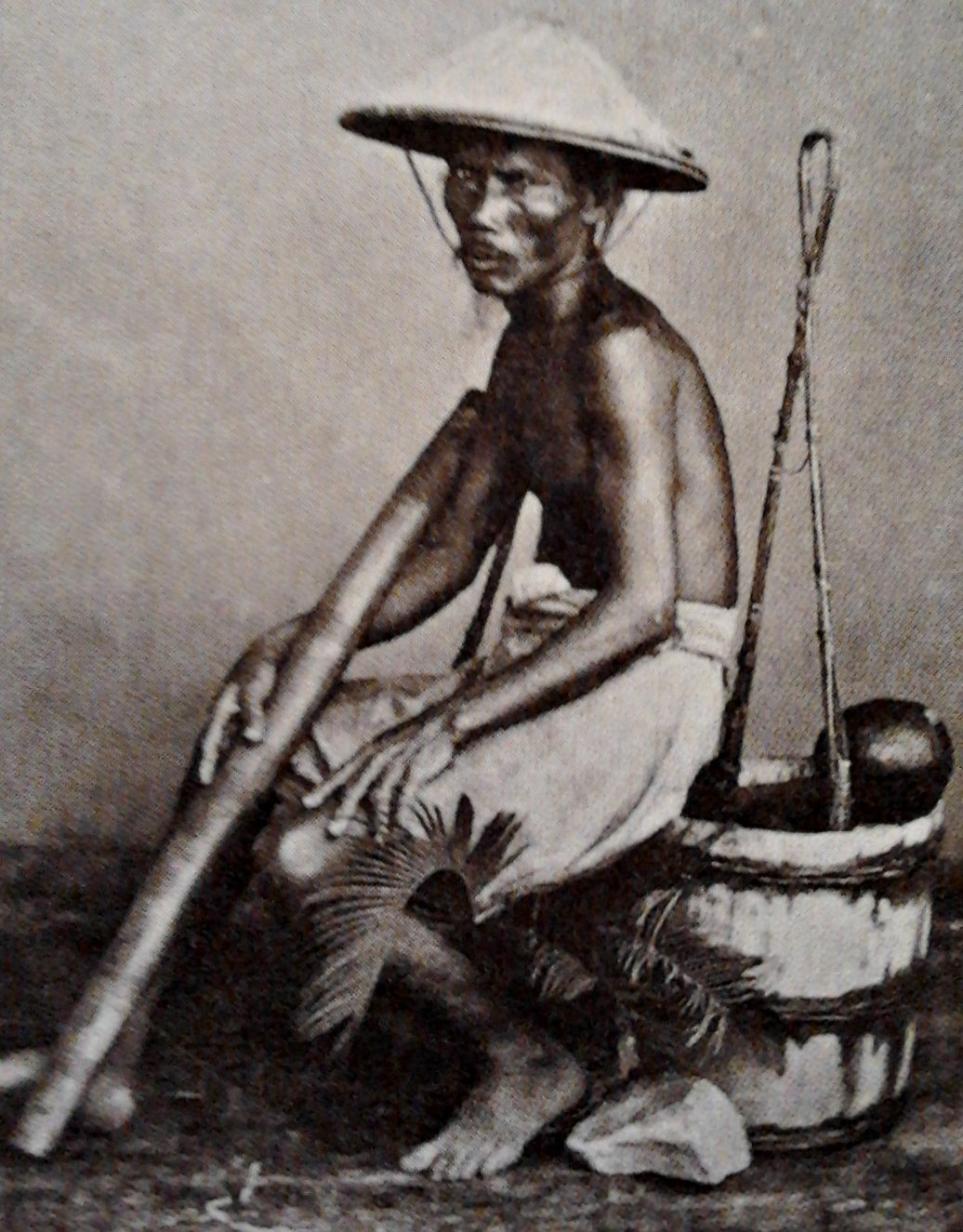 Marchand avec sa pipe à opium. Photo d'Emile Gsell dans son studio de Saigon (années 1870)